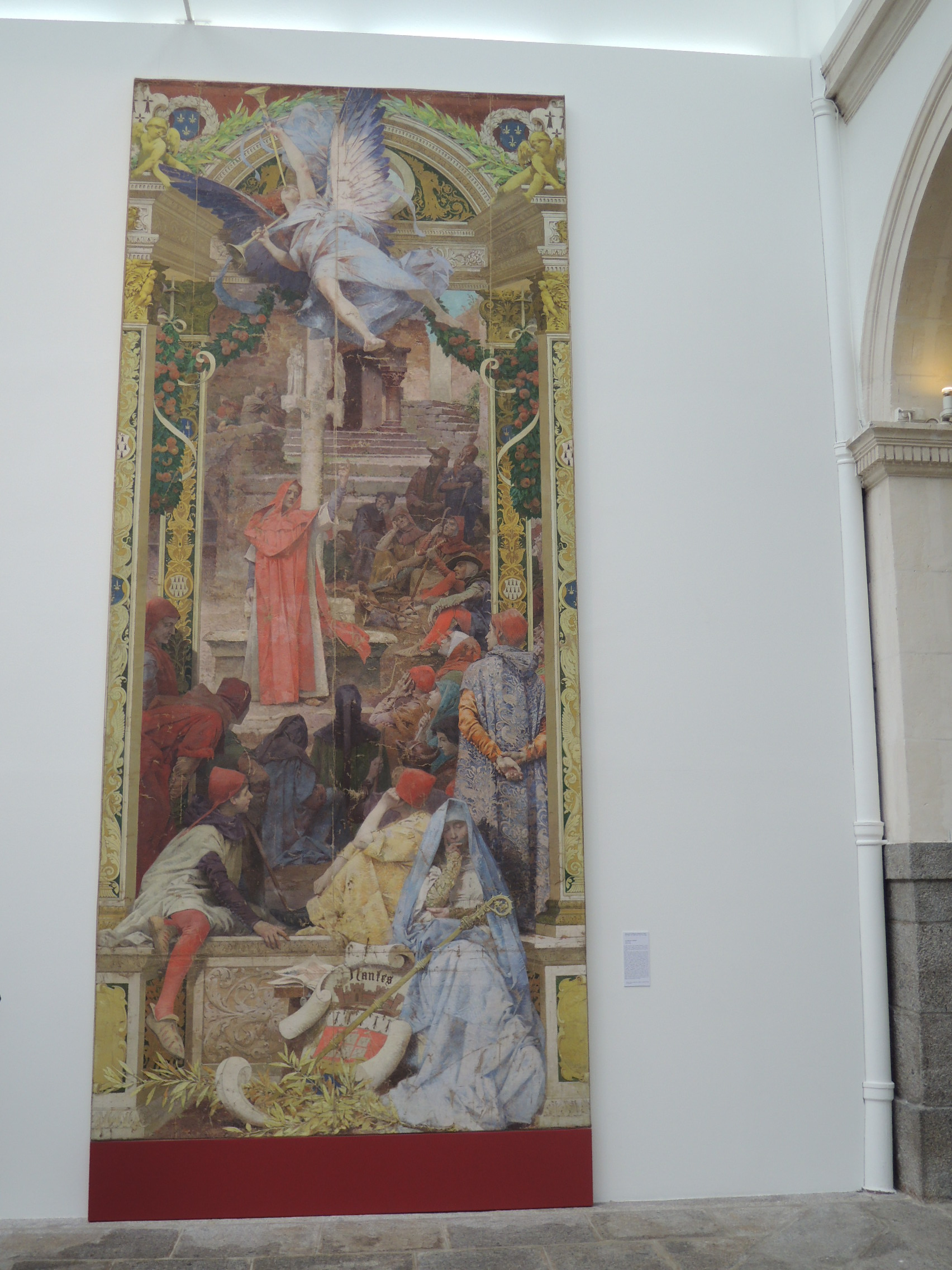 Édouard Toudouze et Maurice Leloir, La Prédication d'Abelard v 1907 Grand carton, huile sur toile